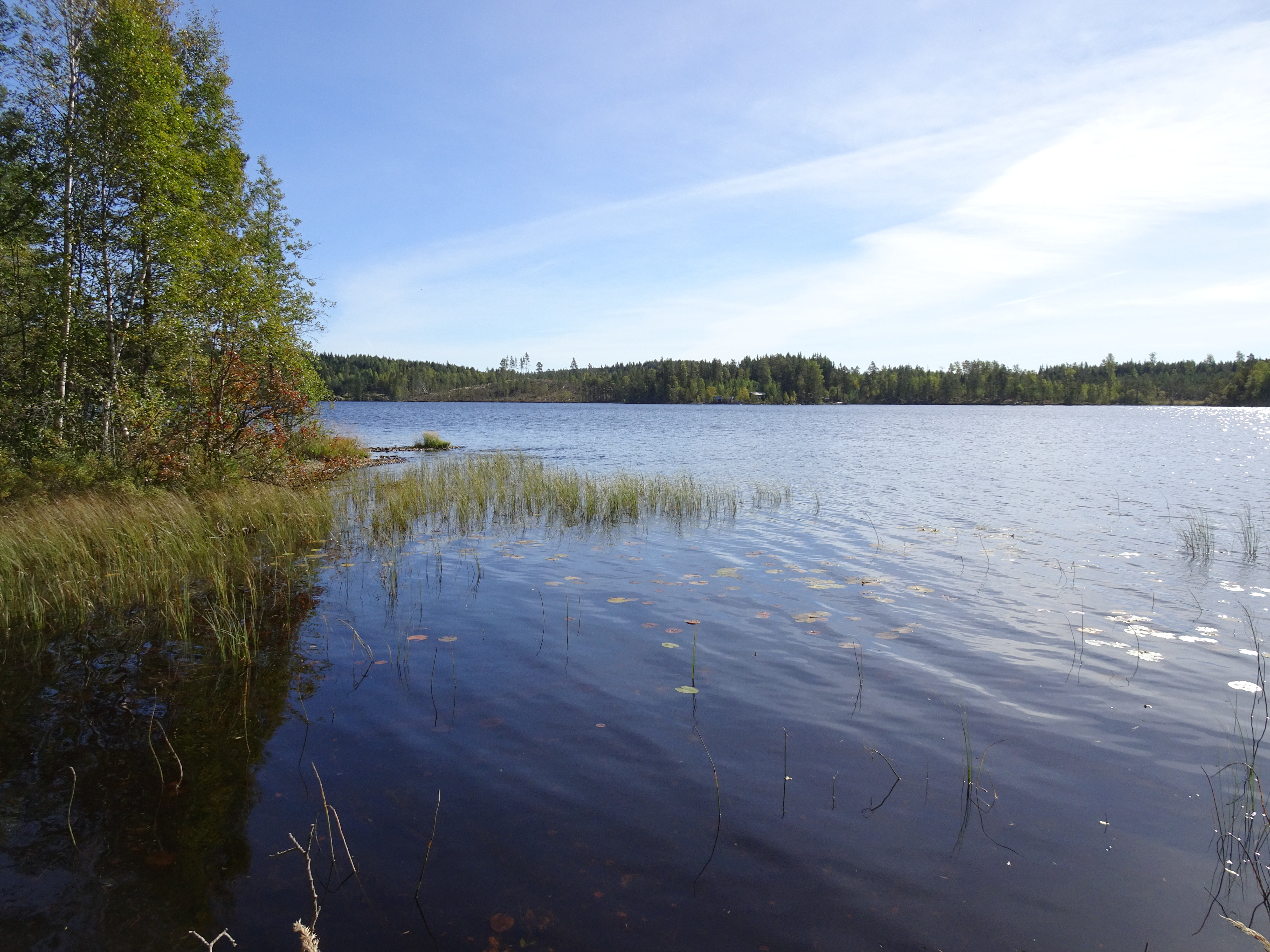 Hästbergs-Flatnan, vy från norr mot sydost